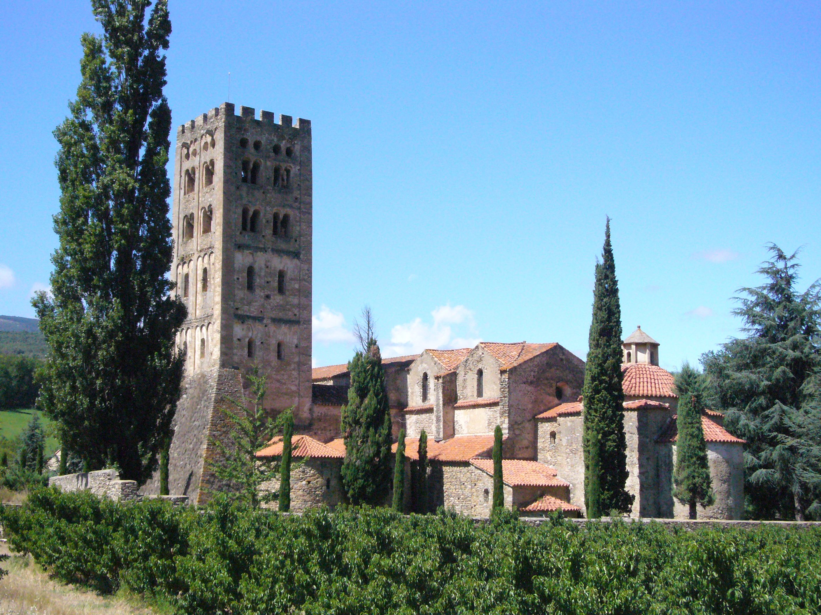 Abbaye Saint-Michel de Cuxa (66, France)